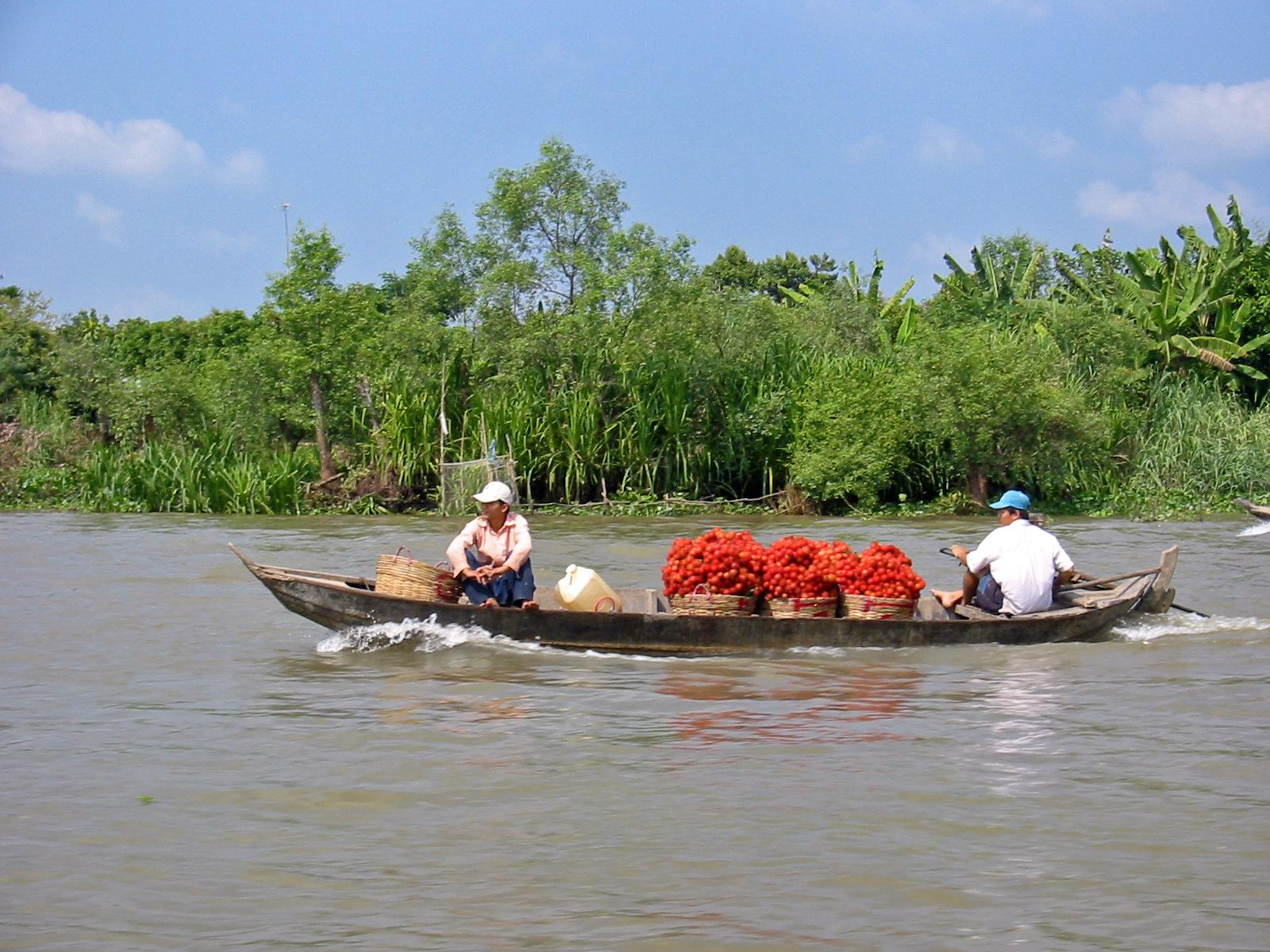 Rambutan Transport in Mekong Delta, Vietnam